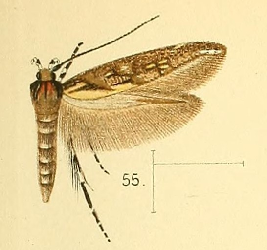 Eteobalea quinquecristata